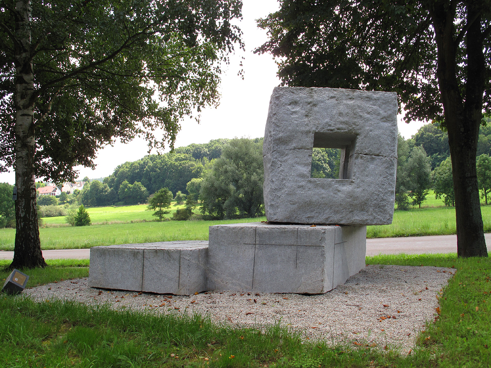 Claudia Farina, Modulo, - Deutschland, Rheinland-Pfalz, Steinwenden